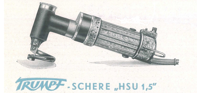 Eine der ersten motorbetriebenen Handscheren von TRUMPF